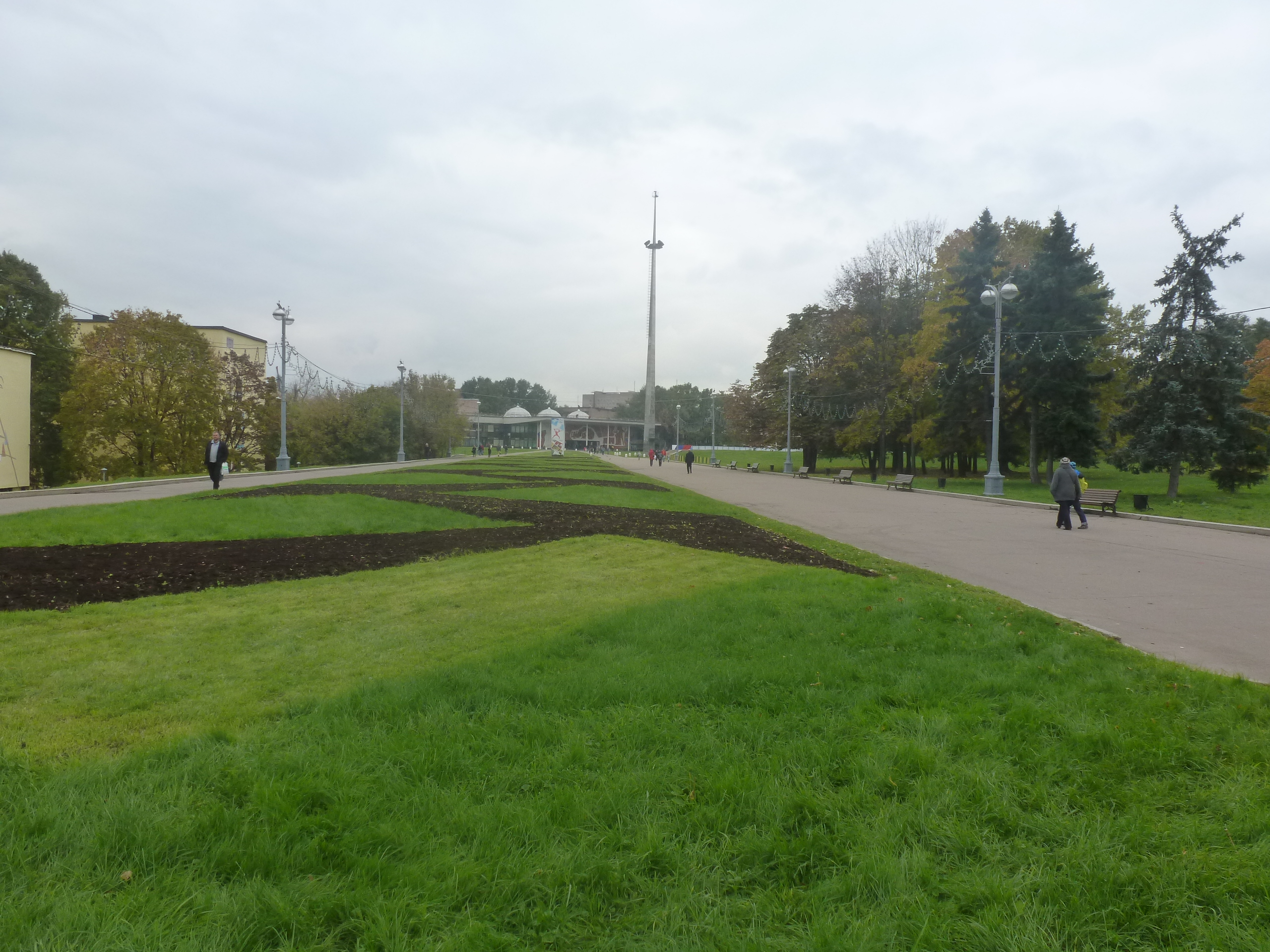 Palaco de junpioniroj cxe Montoj Vorobjovi